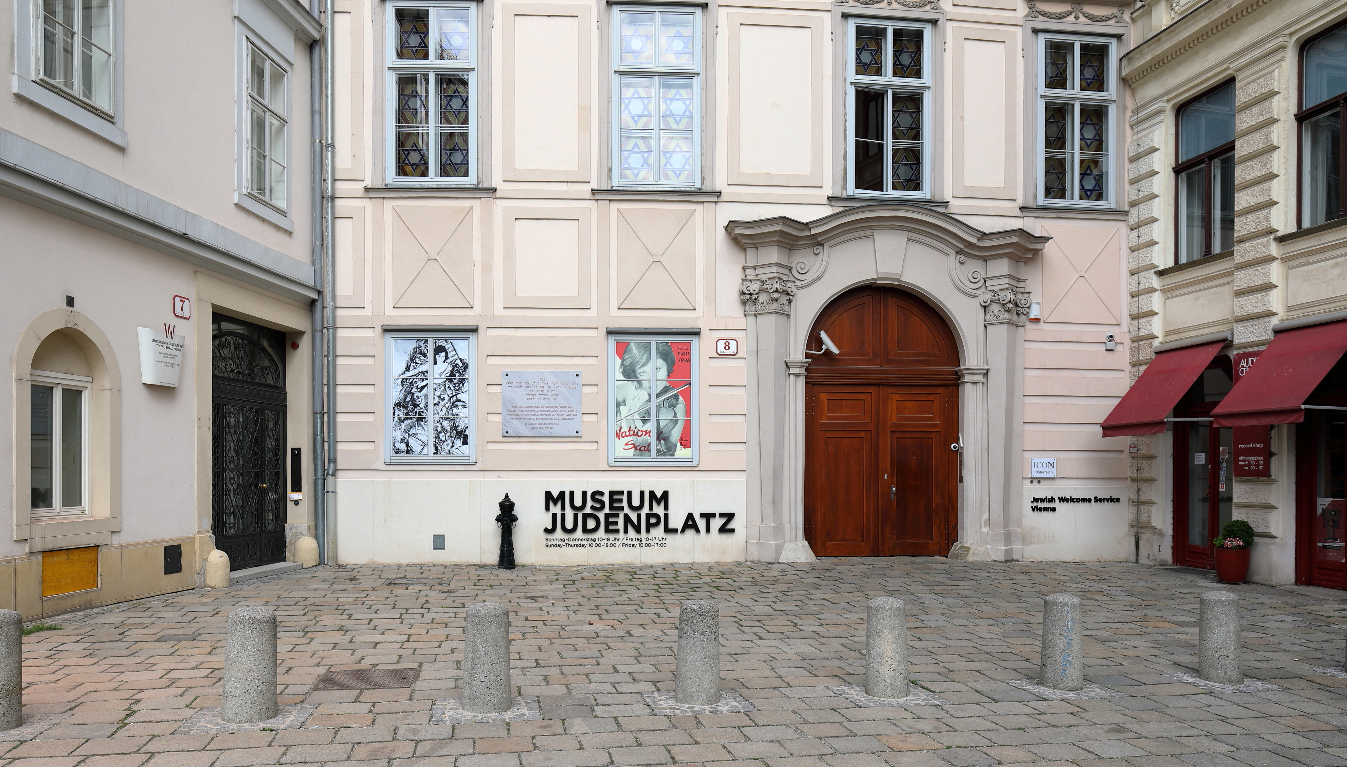 Der Eingangsbereich des „Museums Judenplatz“ im 1. Wiener Gemeindebezirk Innere Stadt. Das Museum befindet sich im Misrachi-Haus und ist eine Zweigstelle des Jüdischen Museums im Palais Eskeles.